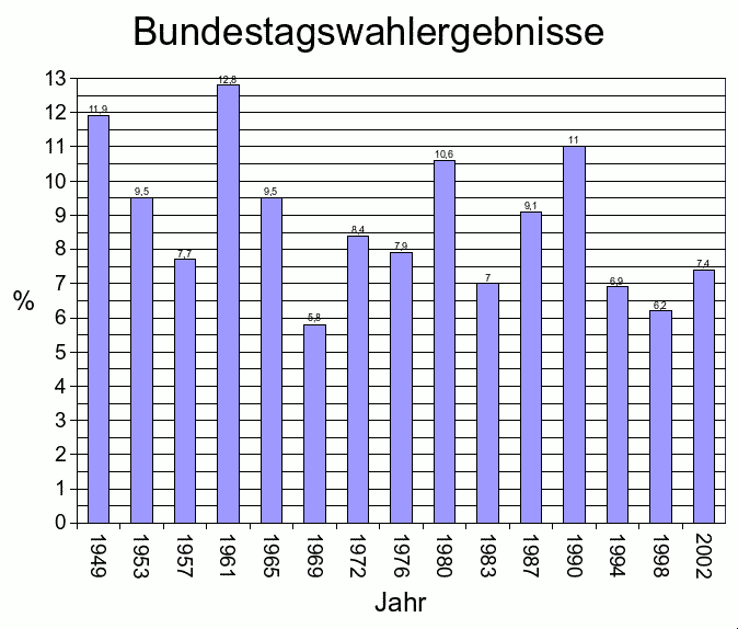 Oppslutningen til FDP i forbundsdagsvalg 1949 - 2002